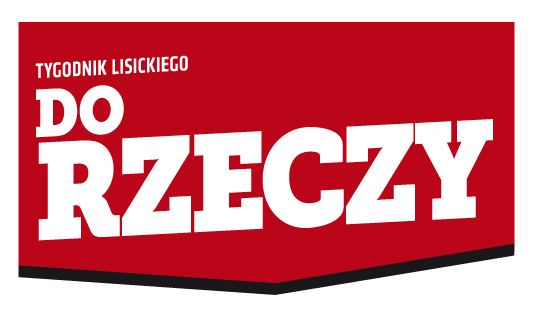 Logo tygodnika "Do Rzeczy".